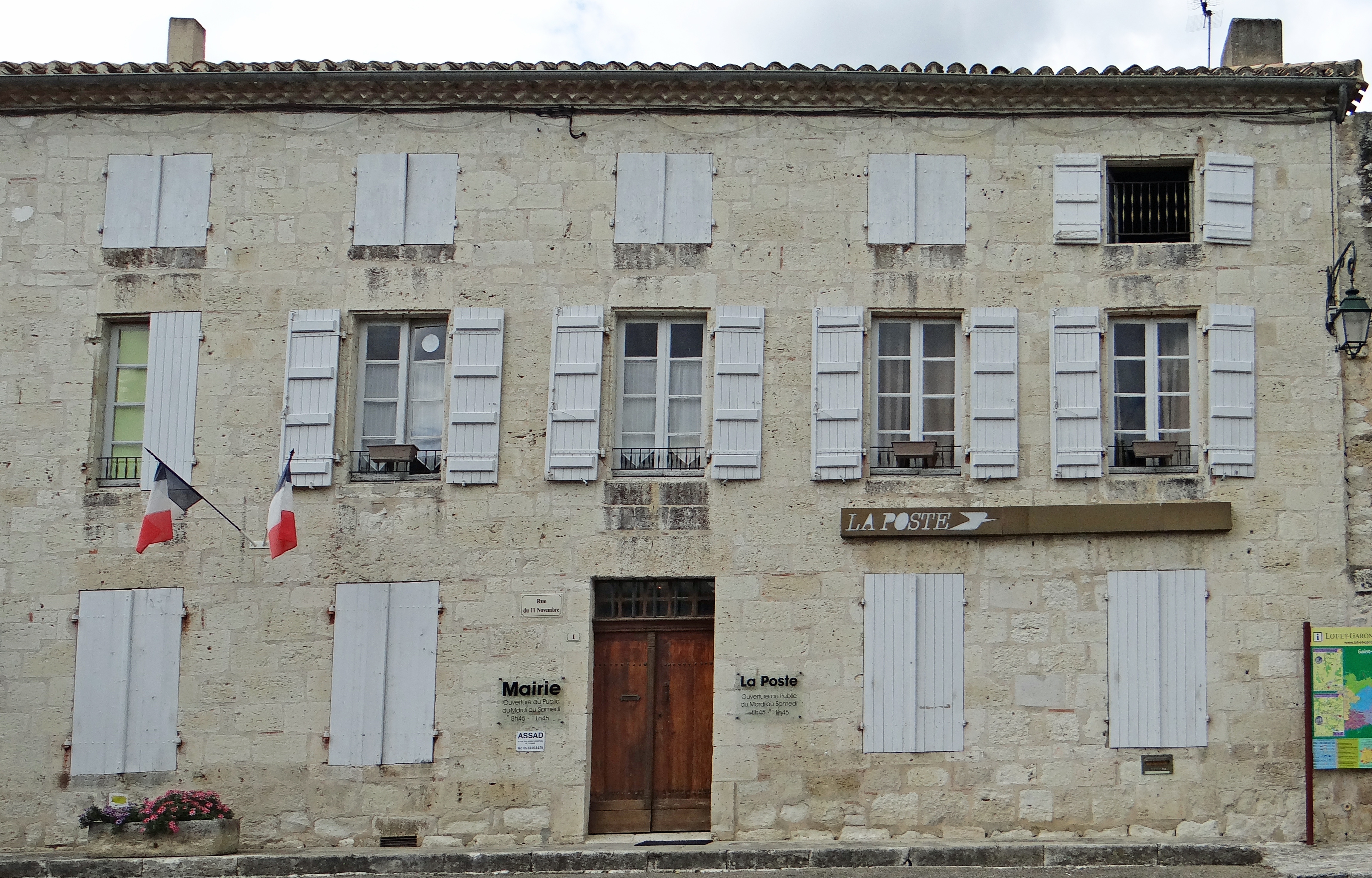 Saint-Maurin - La mairie